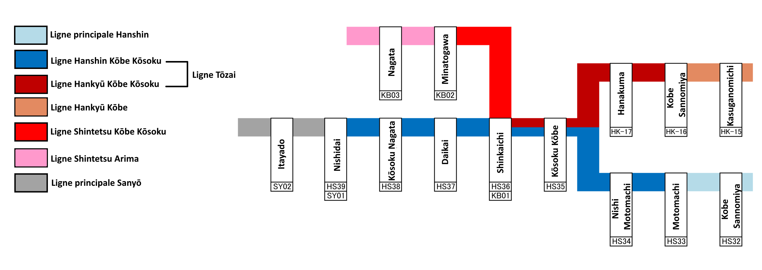 Schéma simplifié des connexions entre différentes lignes et la ligne Kobe Kosoku.